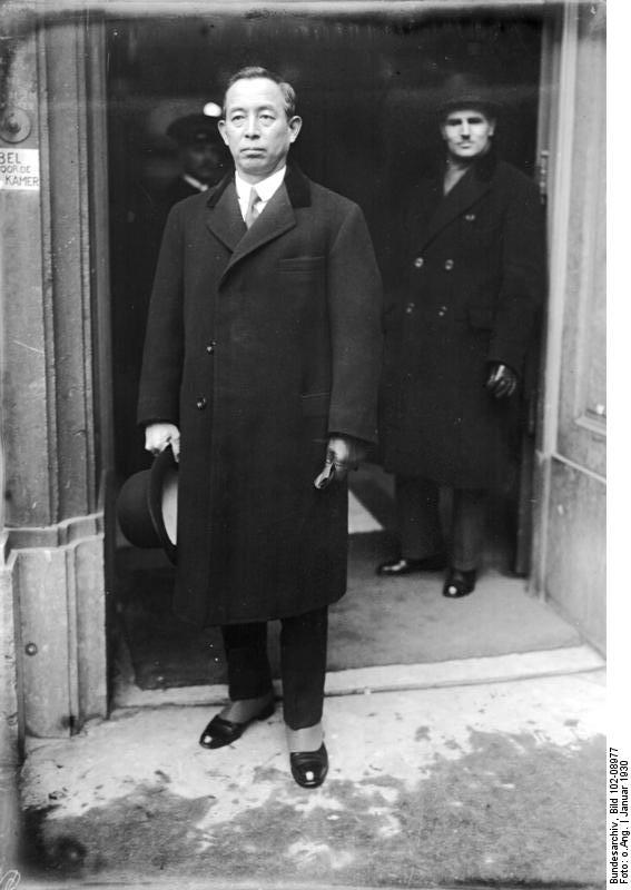 Neueste Aufnahmen von der Haager Schluß-Conferenz! Der japanische Delegationsführer Hirota vor dem Quartier der japanischen Delegation.